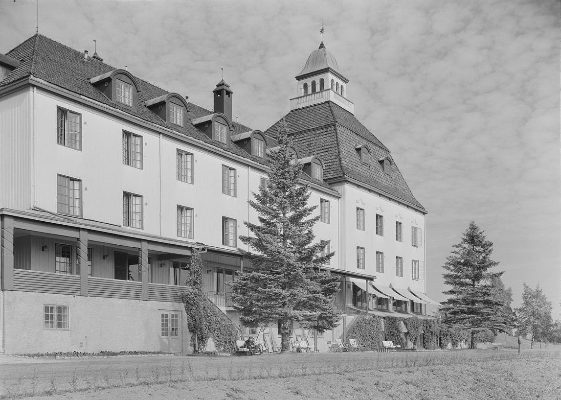 Bildet er hentet fra Nasjonalbibliotekets bildesamling Høsbjør, Ringsaker, Hedmark